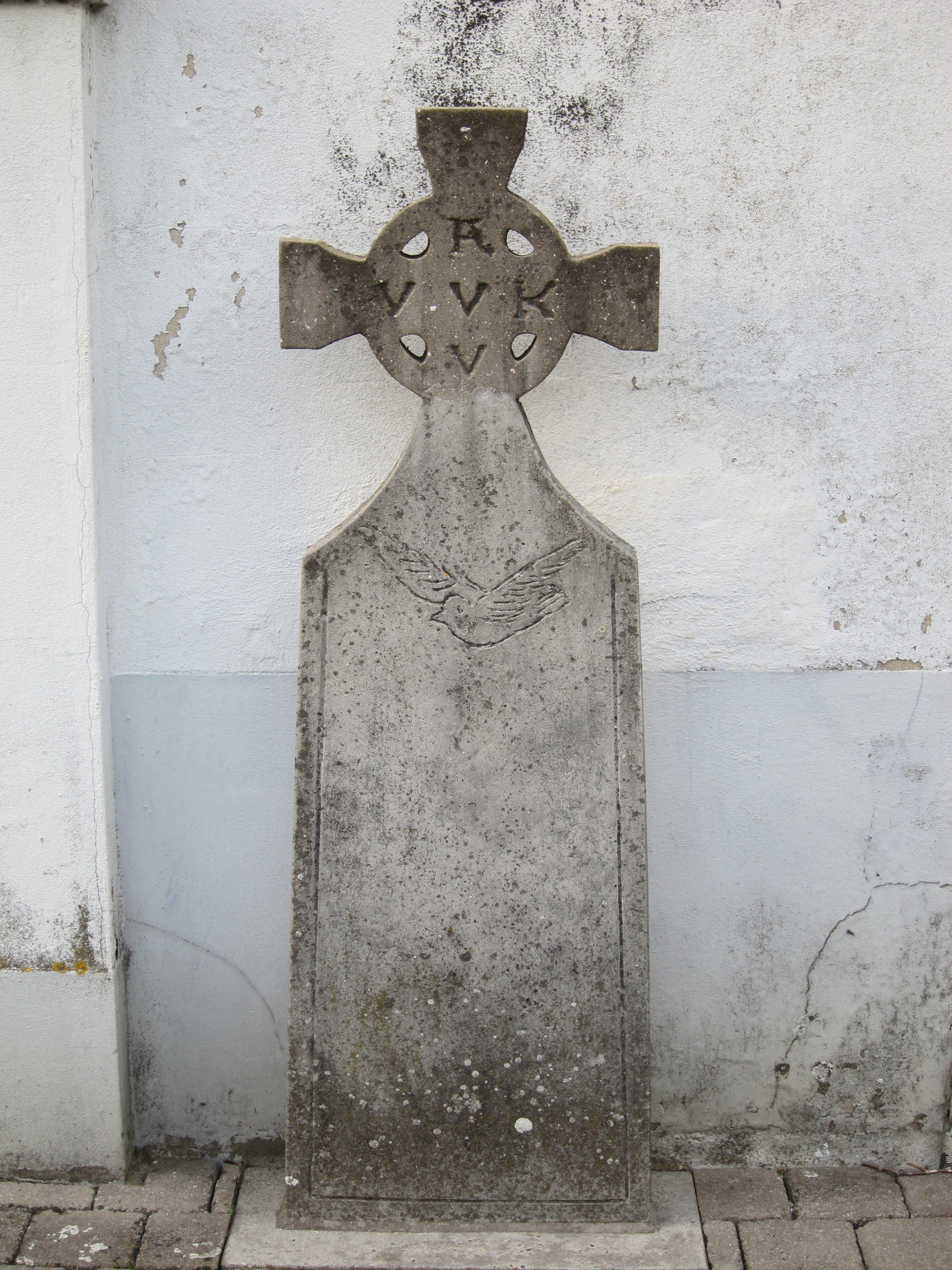 AVV-VVK kruis aan Sint-Michielskasteel, St-Katelijne-Waver